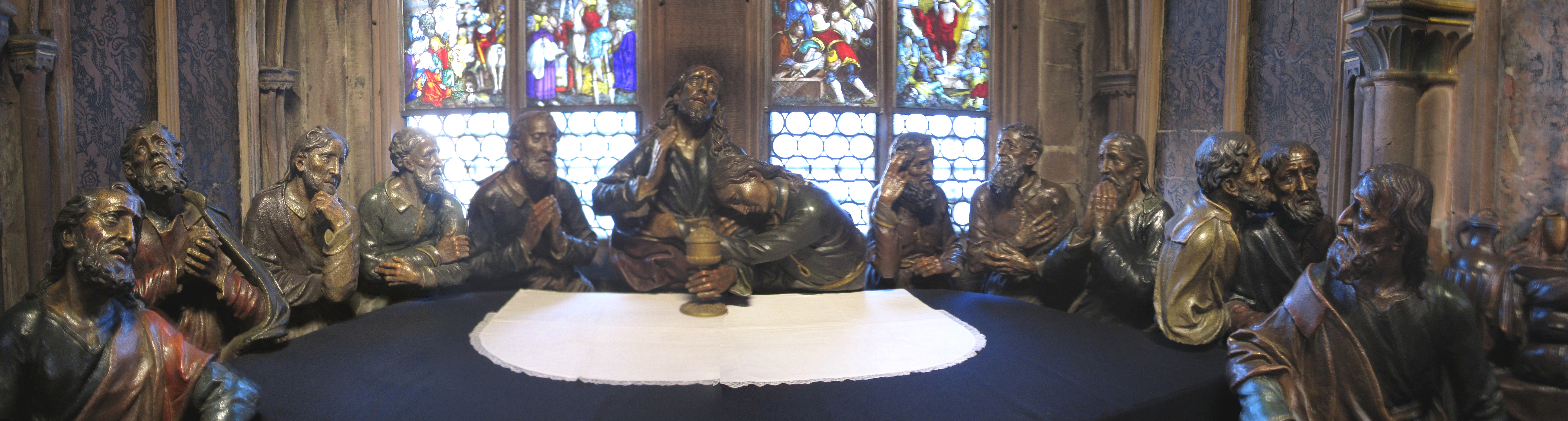 Abendmahlgruppe im Freiburger Münster NOTE: This image is a panorama consisting of multiple frames that were merged or stitched in software. As a result, this image necessarily underwent some form of digital manipulation. These manipulations may include blending, blurring, cloning, and color and perspective adjustments. As a result of these adjustments, the image content may be slightly different than reality at the points where multiple images were combined. This manipulation is often required due to lens, perspective, and parallax distortions.